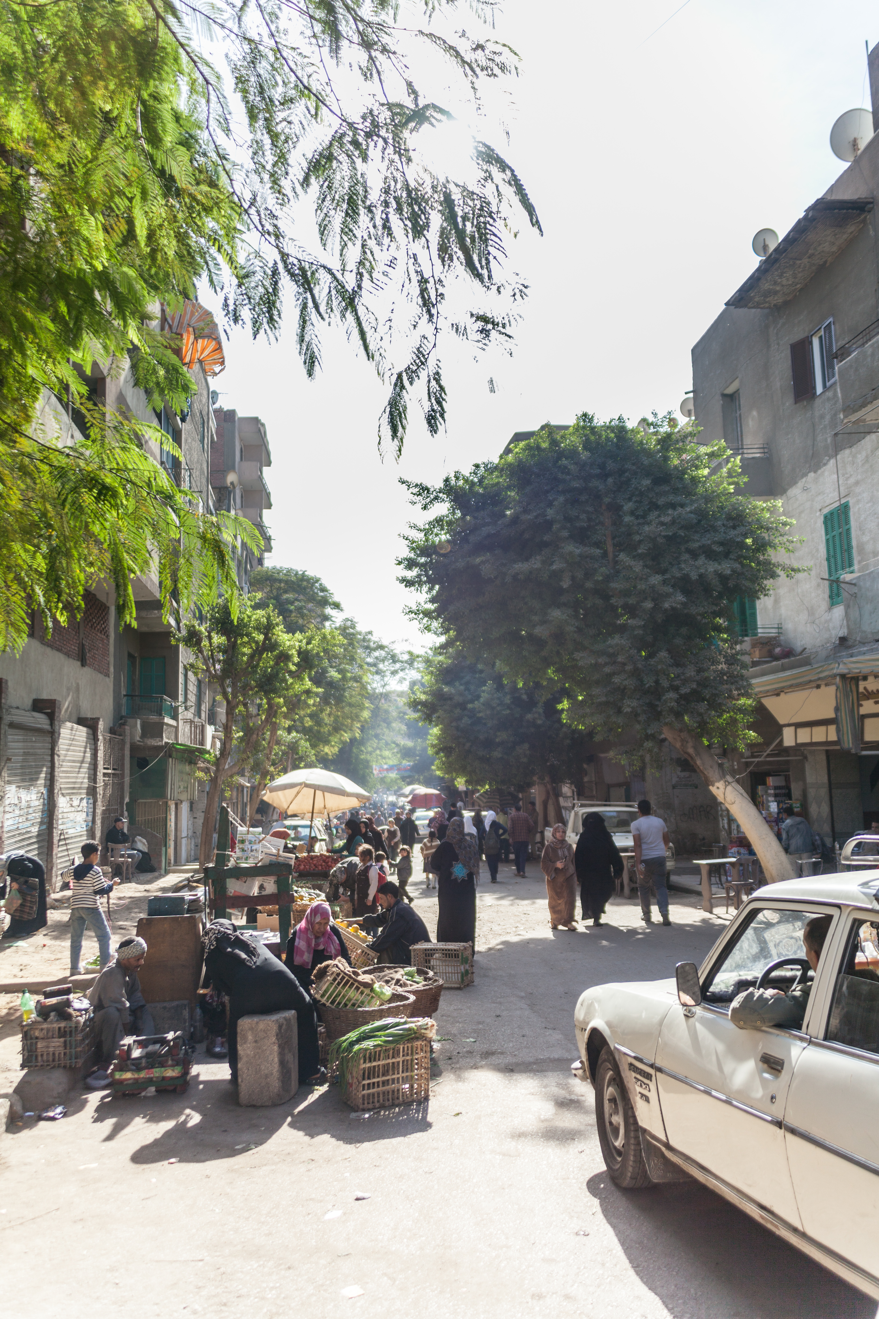 Al Khokhah WA Al Qenayah, Misr Al Qadimah, Cairo Governorate, Egypt